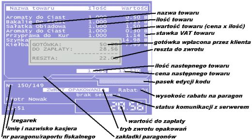 Paragon fiskalny z opisem